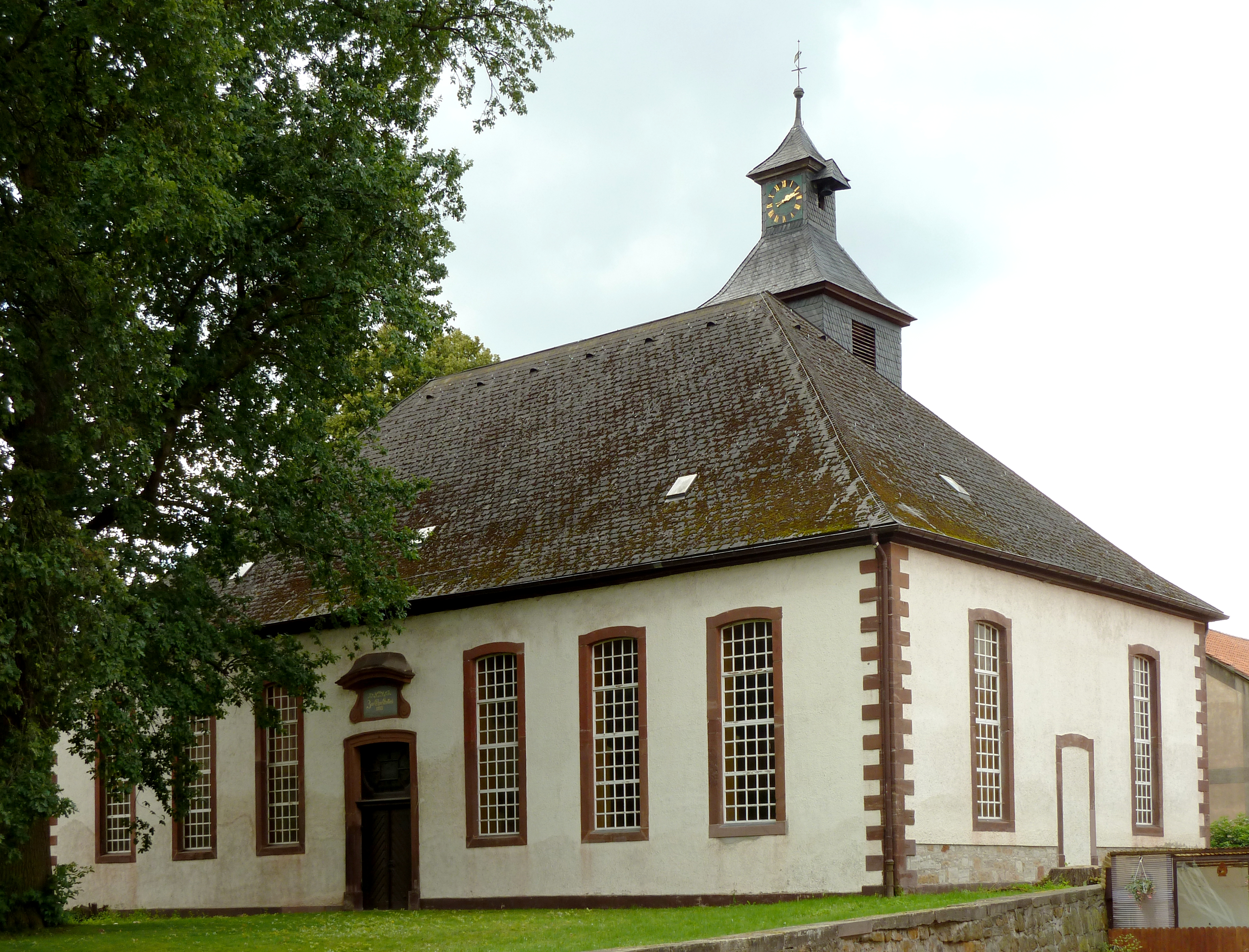 Ev.-luth. Kirche St. Martin in Stöckheim, Stadt Northeim, Niedersachsen. Erbaut 1756-64 als verputzte Saalkirche mit quer angeordnetem Walmdach und vorgelagertem Westturm. Innenrenovierung 1983/84, mittelalterlicher Vorgängerbau nachgewiesen